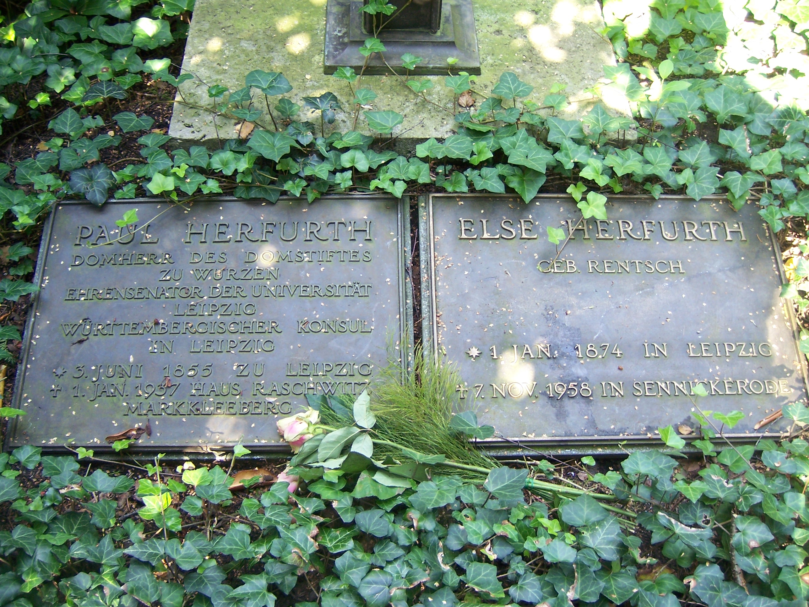 Grabplatte Paul Herfurth und Frau